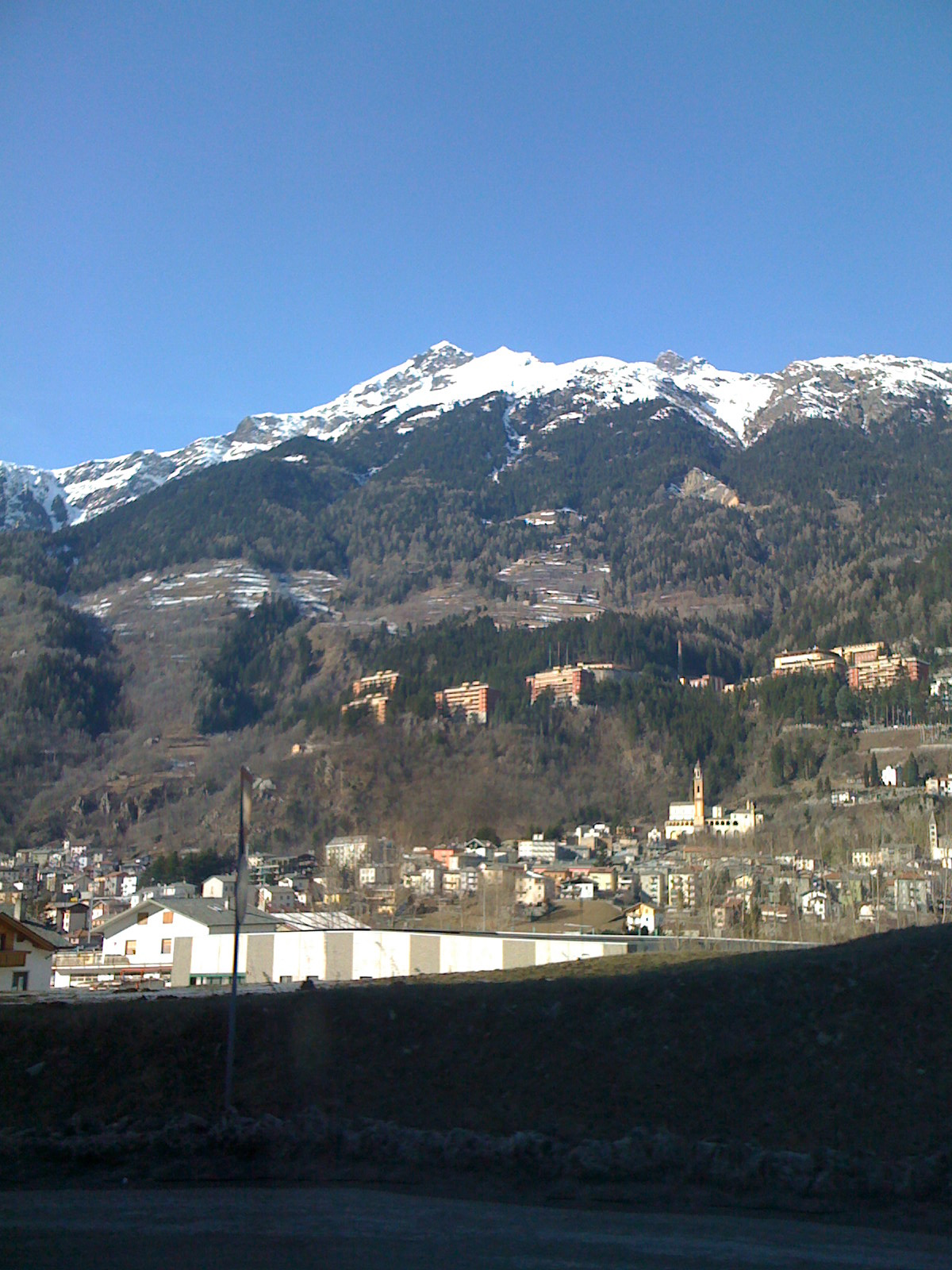 Ritorno